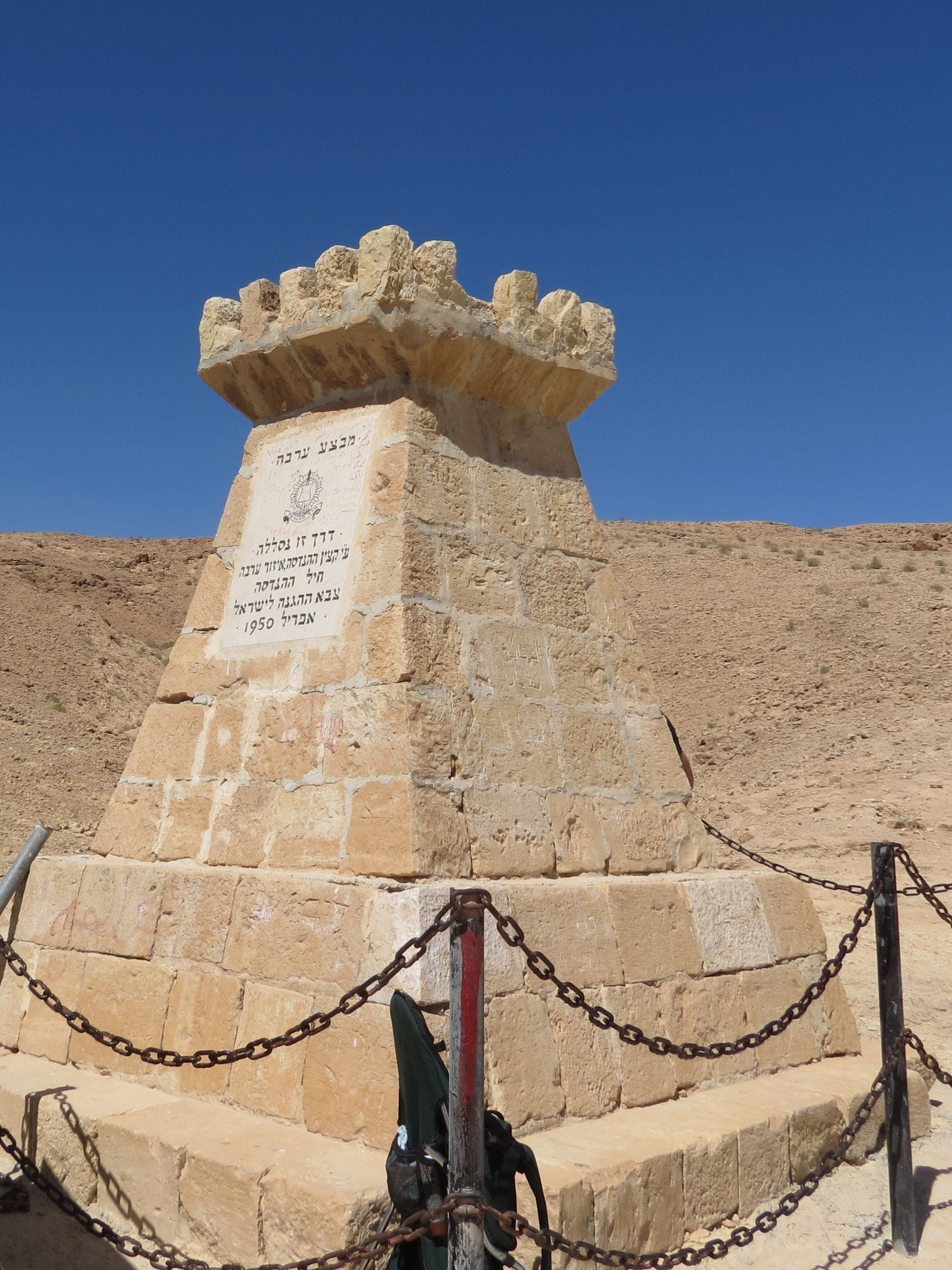 אנדרטה למבצע ערבה בראש מעלה עקרבים